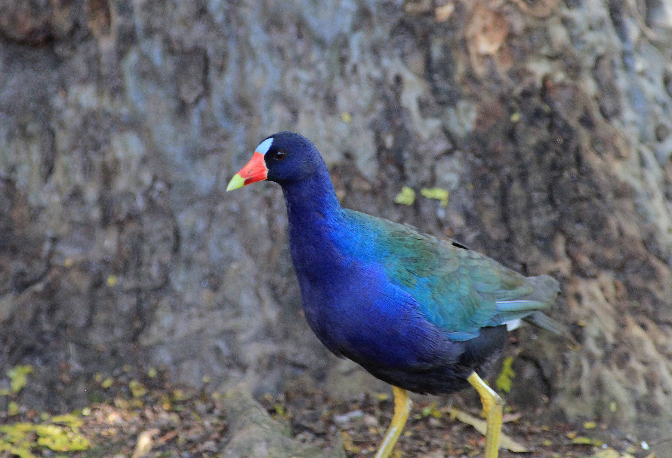 Frango-d'água-azul adulto - Porphyrio martinica